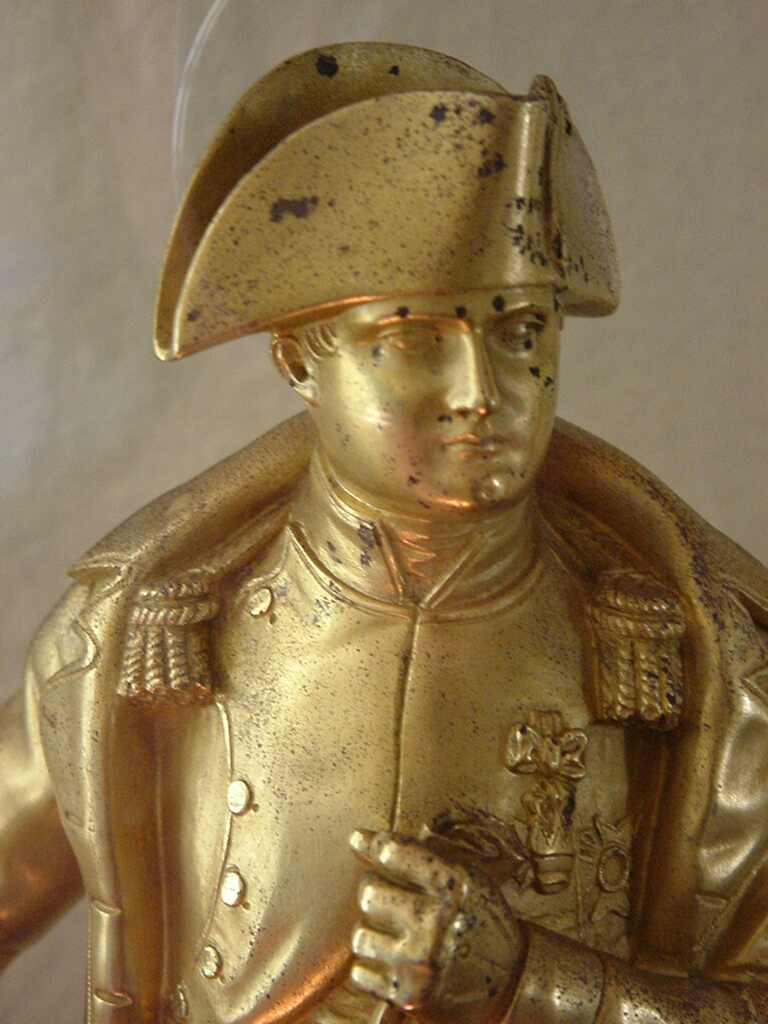 Napoleons Büste in Ajaccio